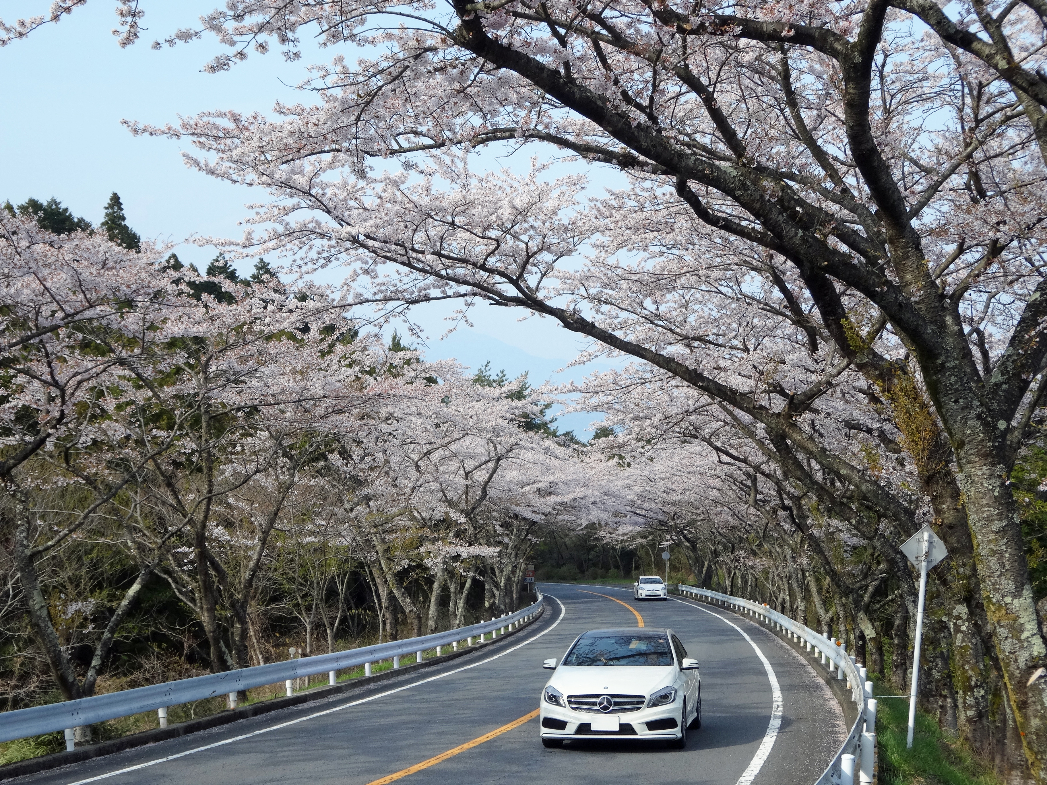 箱根ターンパイクの桜